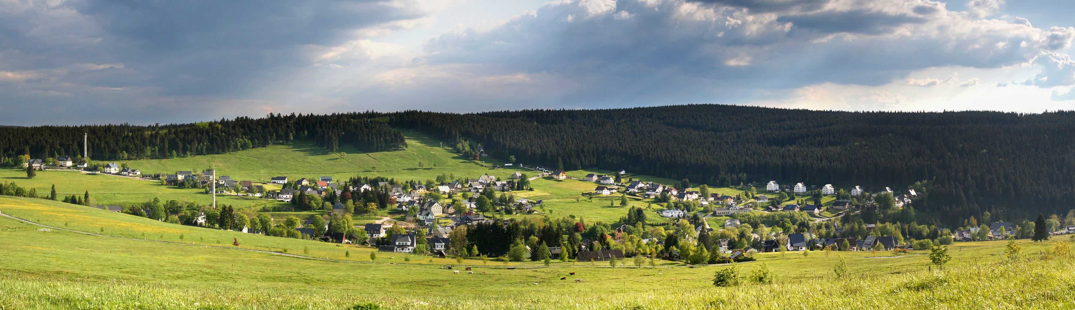 Panorama von Carlsfeld im Juni 2006